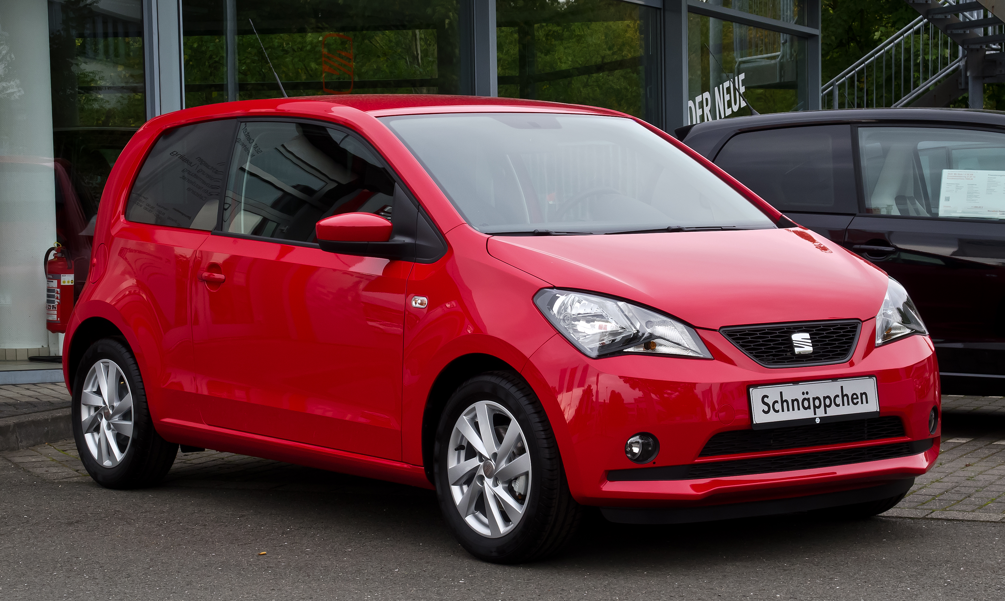 Seat Mii 1.0 Style